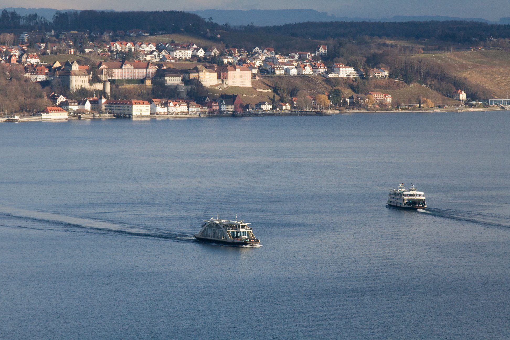 Zwei Autofähren der Autofähre Konstanz–Meersburg vor Meersburg am Bodensee